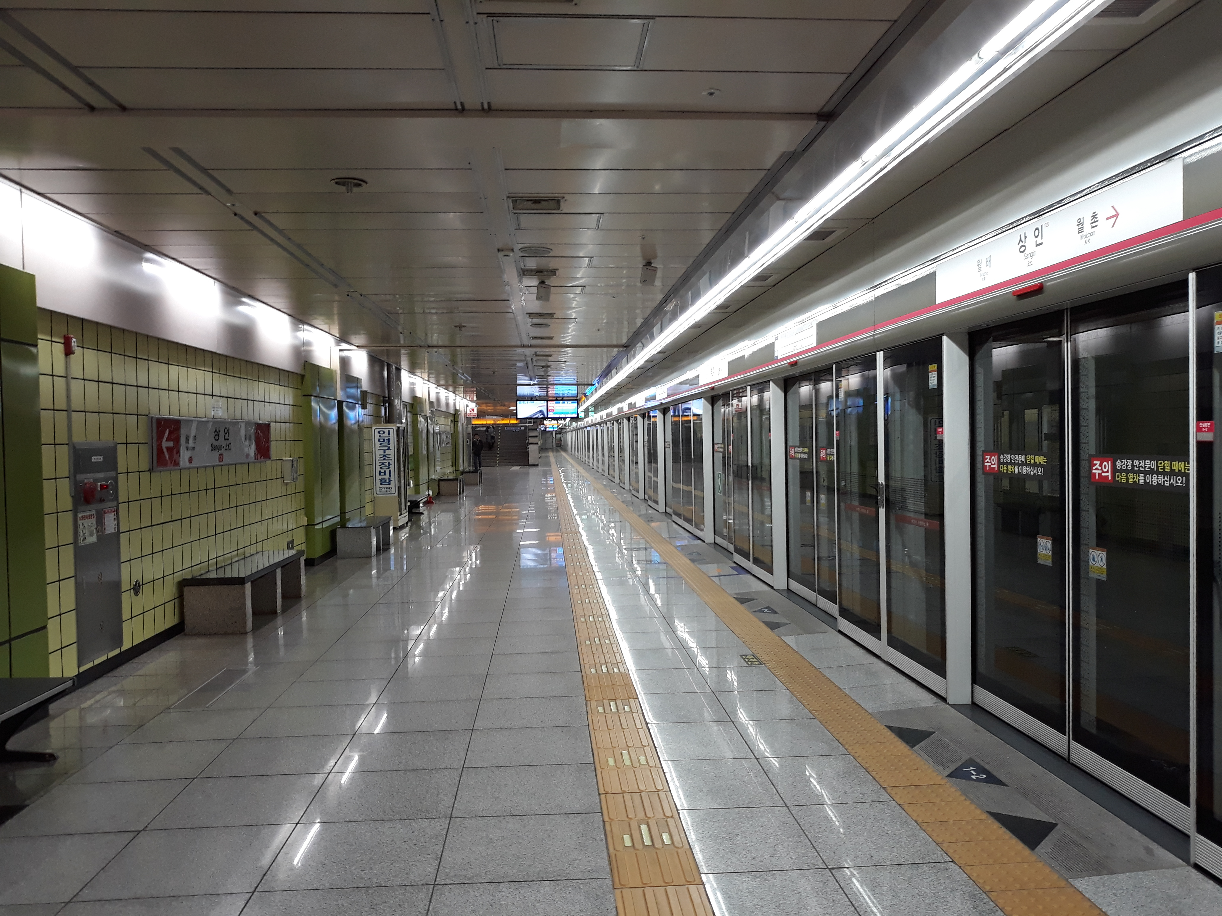 대구 도시철도 1호선 상인역 안심 방면 승강장